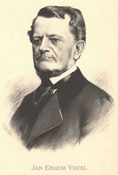 Portréty předních osobností od Jana Vilímka